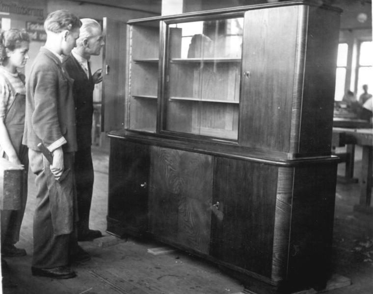 Salbke, Möbelfabrik, Endkontrolle Illus Rösener 11.7.1951 Ist das Gesellenstück gelungen? In der Lehrwerkstatt des RAW (Reichsbahnausbesserungswerk) Salbke in Magdeburg lernen die Tischlerlehrlinge auch die Herstellung von Möbeln. UBz: Ein Bücherschrank wird auf Abnahmereife geprüft.